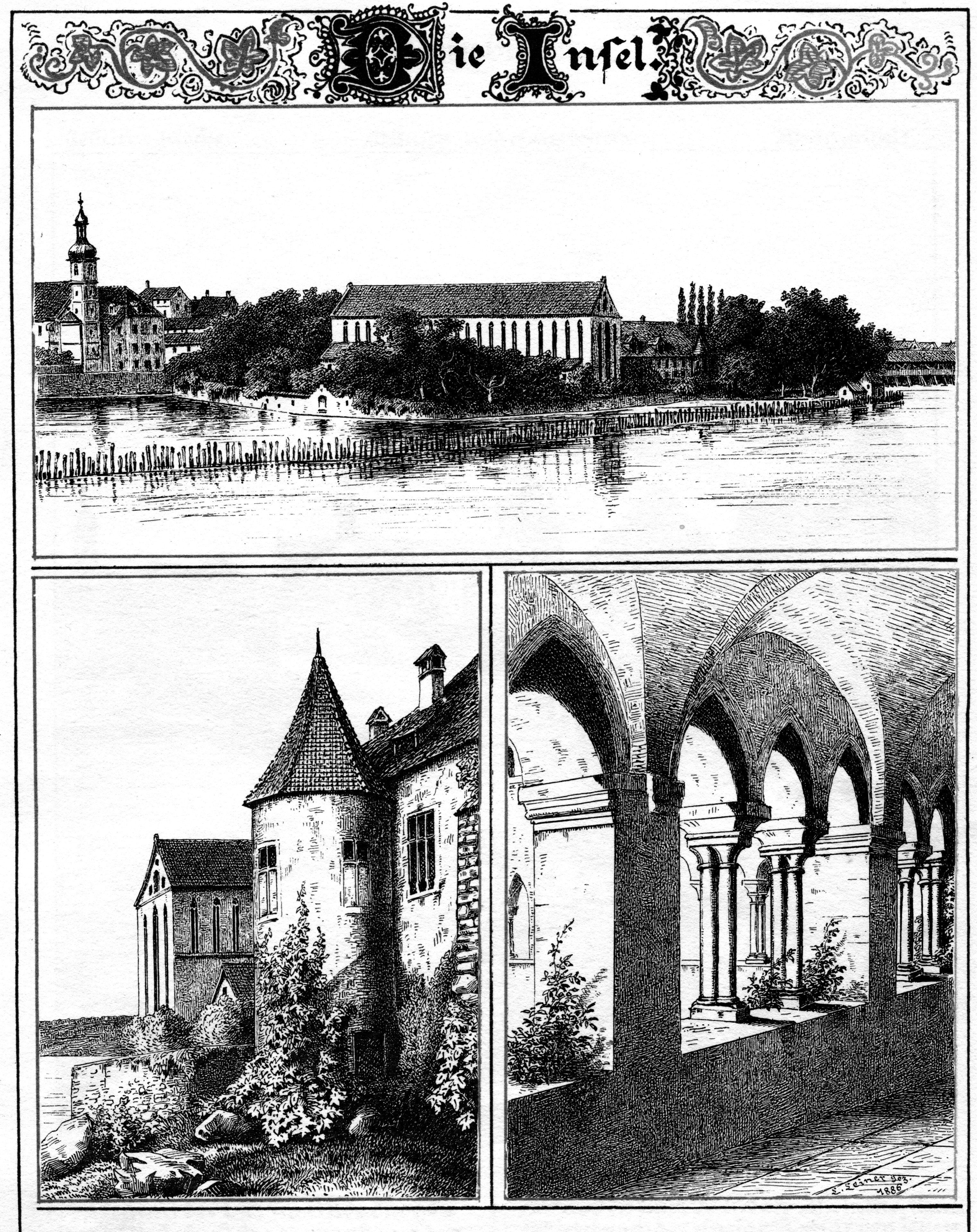 Ludwig Leiner (1830-1901): Inselkloster (Konstanz)